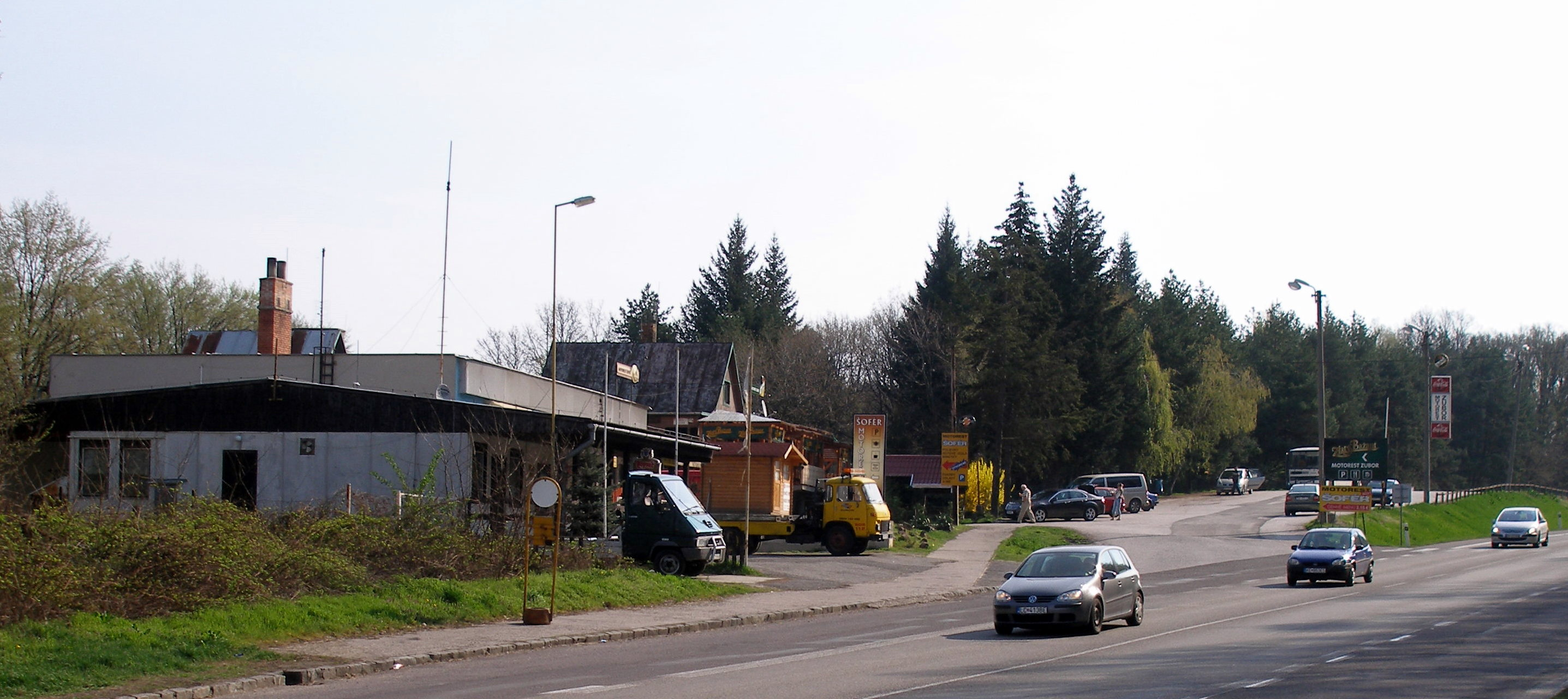 Obec Volkovce okres Zlaté Moravce